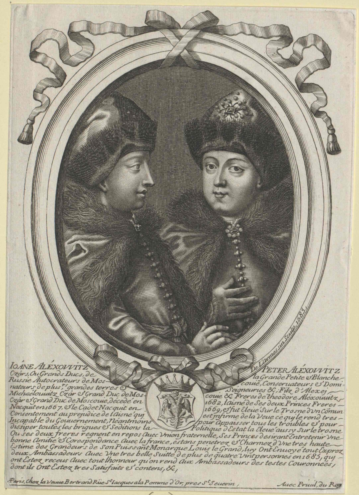 Цари Иоанн и Петр Алексеевичи. Французская гравюра 1685 года. Лармессен Николай (Nicolas de Larmessin, французский гравер) Источник иллюстрации: Морозов А.В. Каталог моего собрания русских гравированных и литографированных портретов. М., 1913?, Т.3. Место иллюстрации в источнике: стр. CCCXVIII